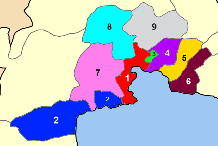 Χάρτης των ενοτήτων (και πρώην δήμων) από τις οποίες αποτελείται ο Δήμος Βόλου